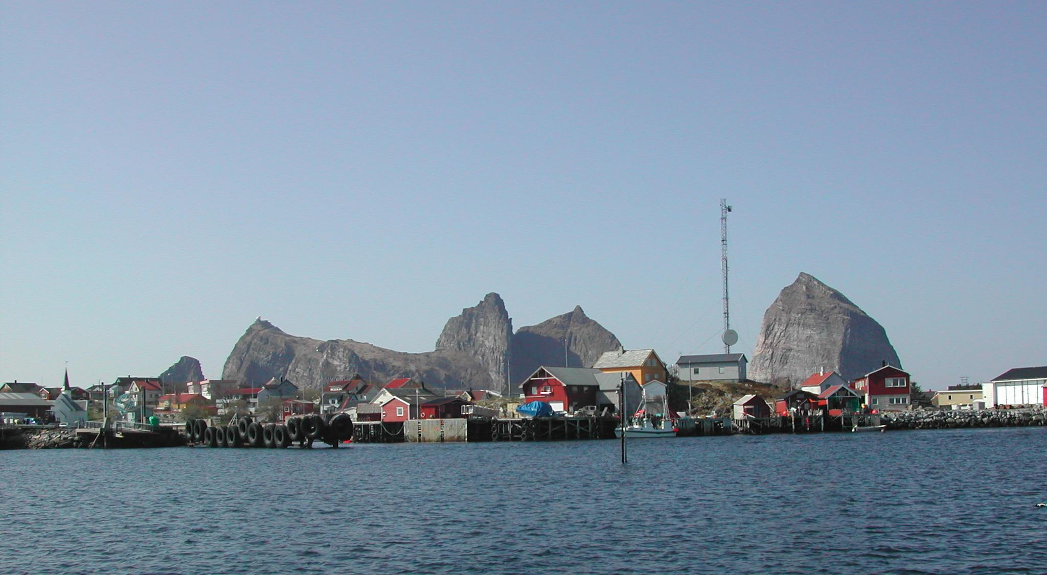 Harbor of Husøya from sea